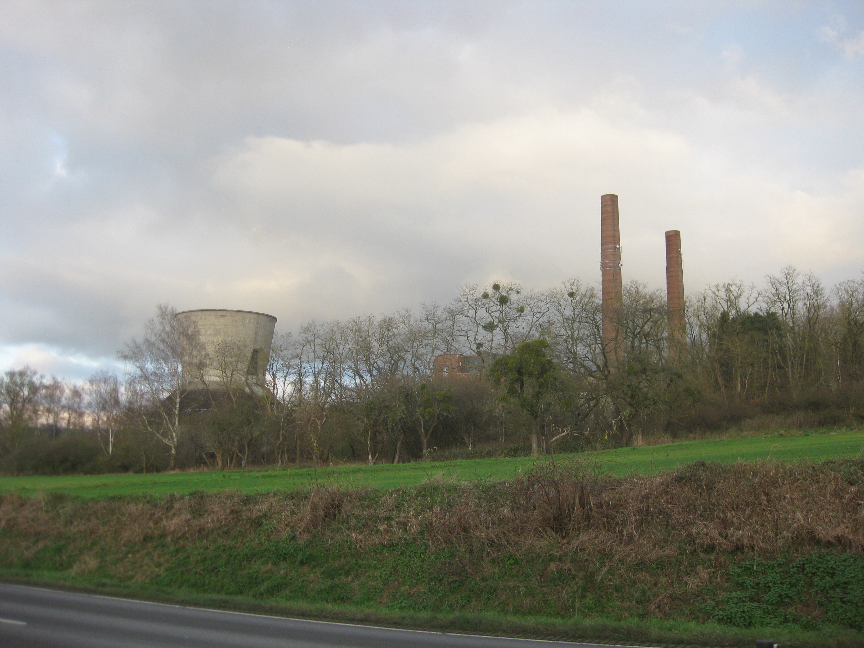 Schornsteine und Kühlturm des ehemaligen Schickertwerkes in Rhumspringe